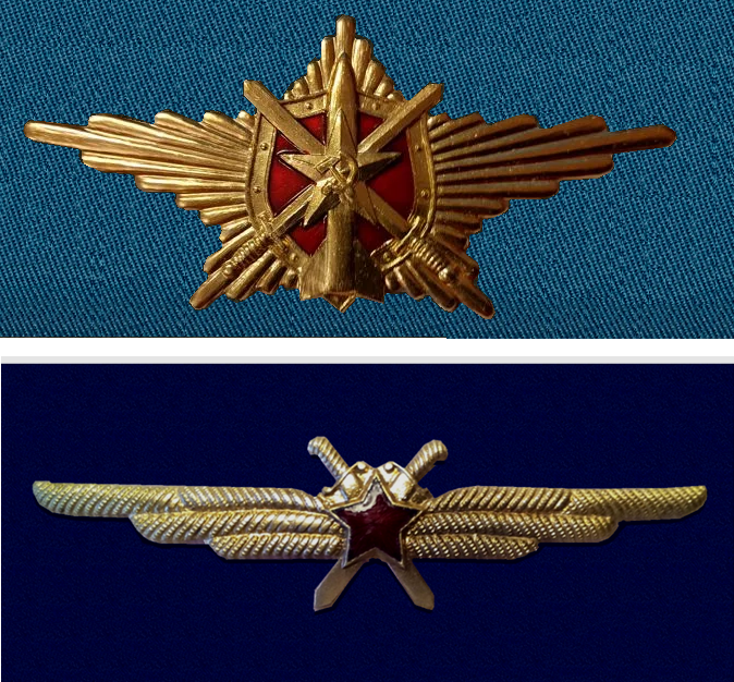 Нз орпк1